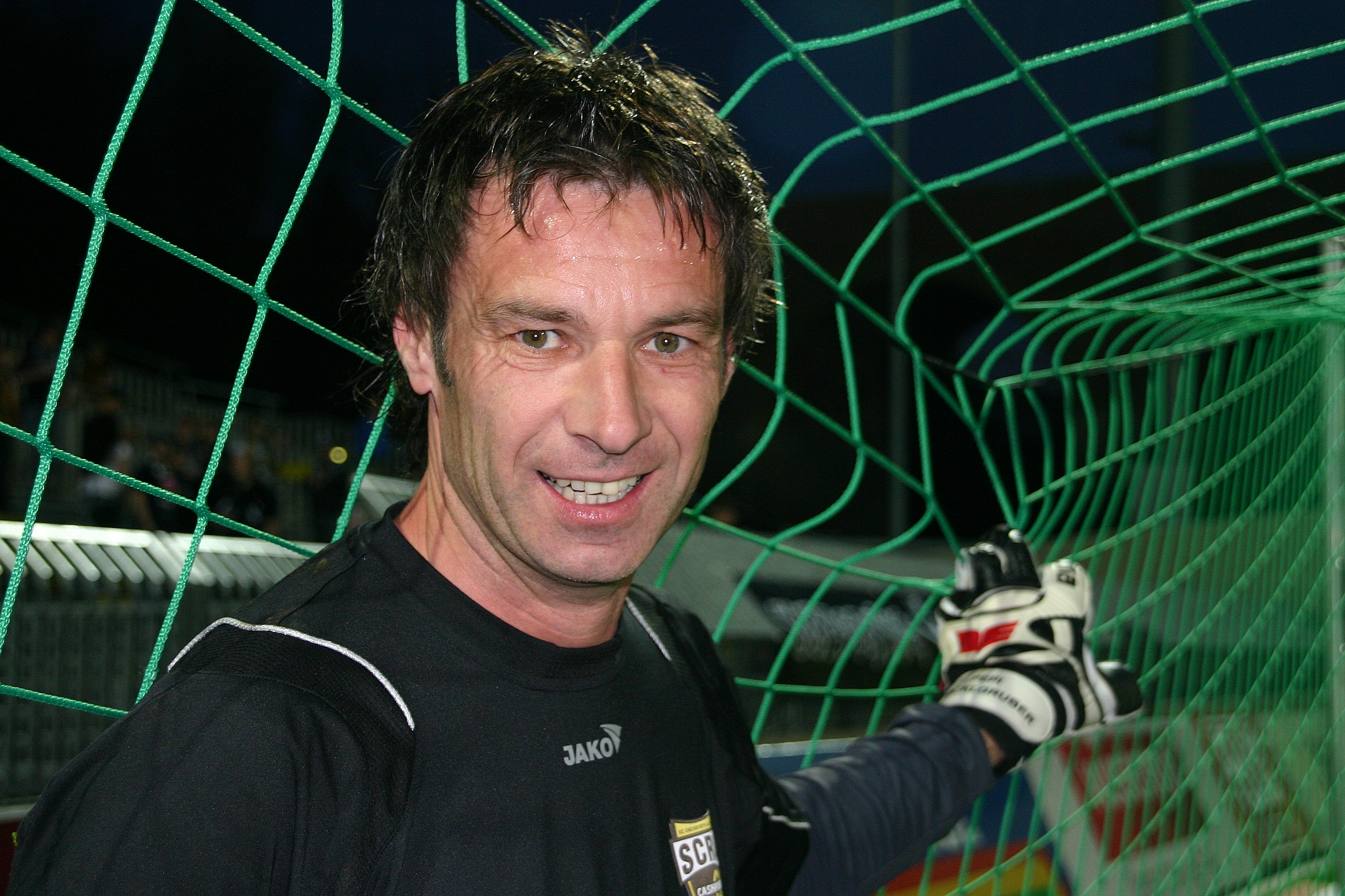 Josef Schicklgruber, Torhüter – SC Rheindorf Altach